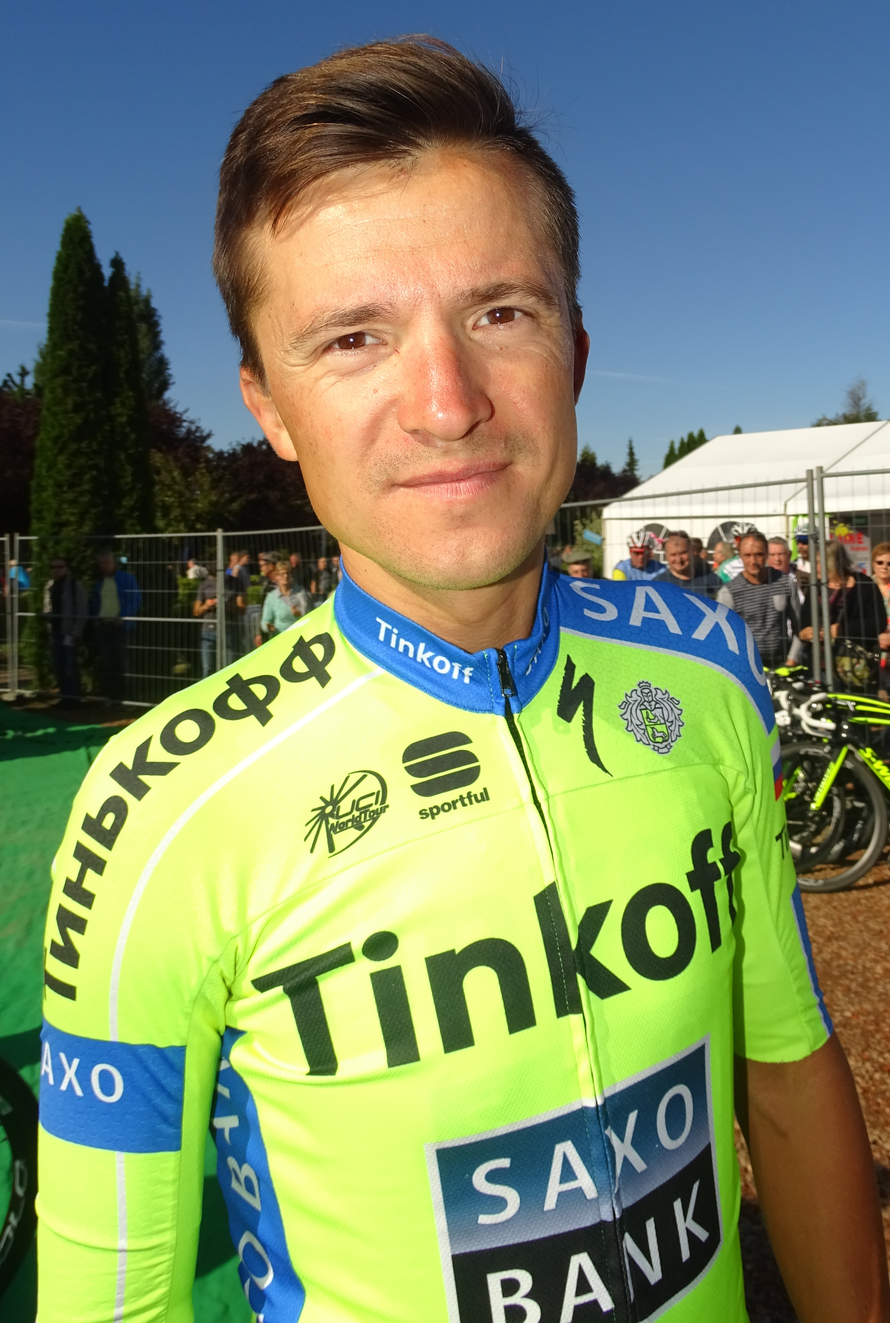 Reportage réalisé le dimanche 20 septembre à l'occasion du départ et de l'arrivée du Grand Prix d'Isbergues 2015 à Isbergues, Nord-Pas-de-Calais, France.